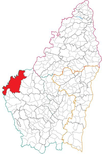 Situation du canton de Coucouron dans le département de l'Ardèche (France)